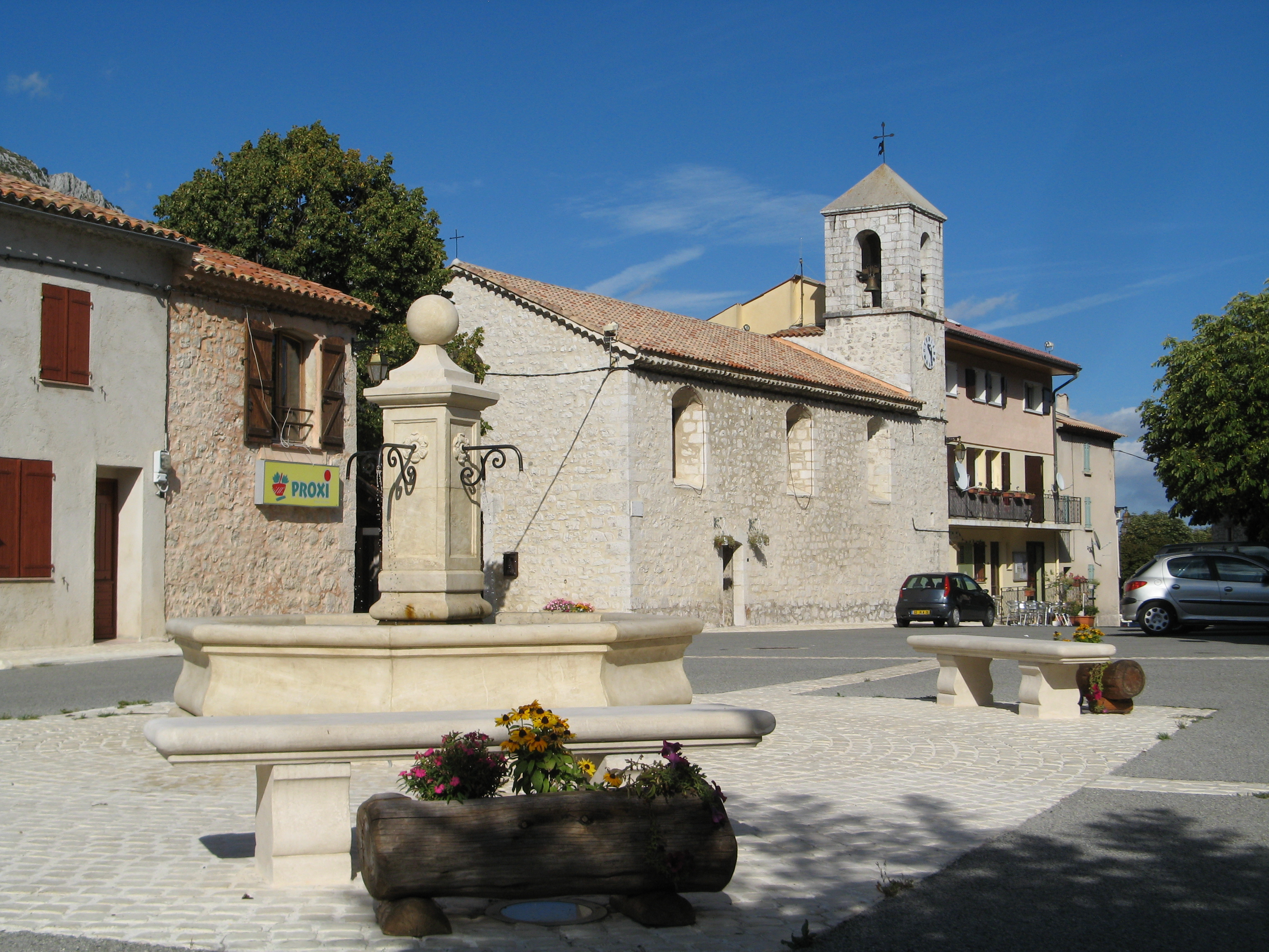 Andon (Alpes-Maritimes), la place Victorin Bonhomme et l'église Sainte-Claire.